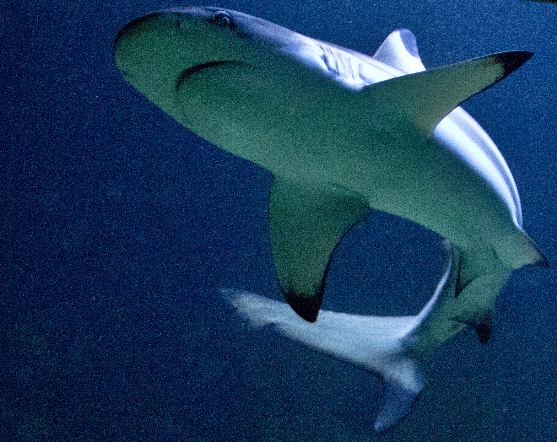 Haai in de zoo van AntwerpenUnknown